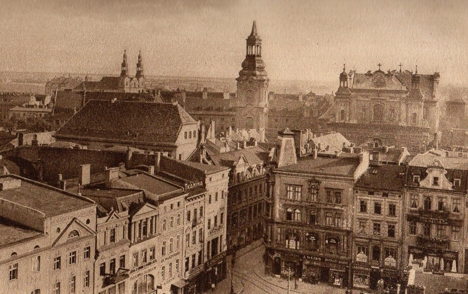 Stary Rynek w Poznaniu w okolicach PeWuKi, 1929r.